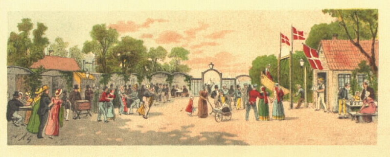 De fattiges Dyrehave, former amusement park in Copenhagen